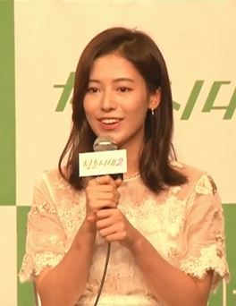 22일 오후 서울 영등포 타임스퀘어 아모리스에서 JTBC 금토드라마 '청춘시대2' 제작발표회가 열렸다.